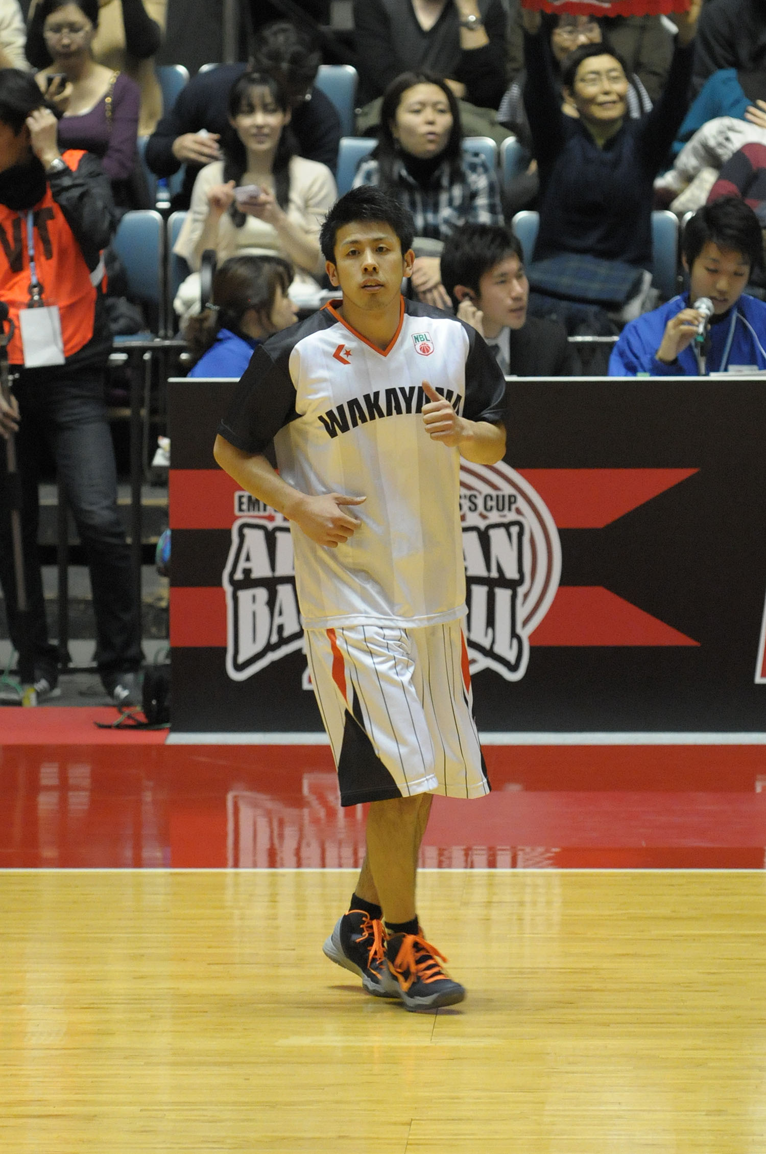 和歌山トライアンス、中島良史選手。代々木第一体育館で。